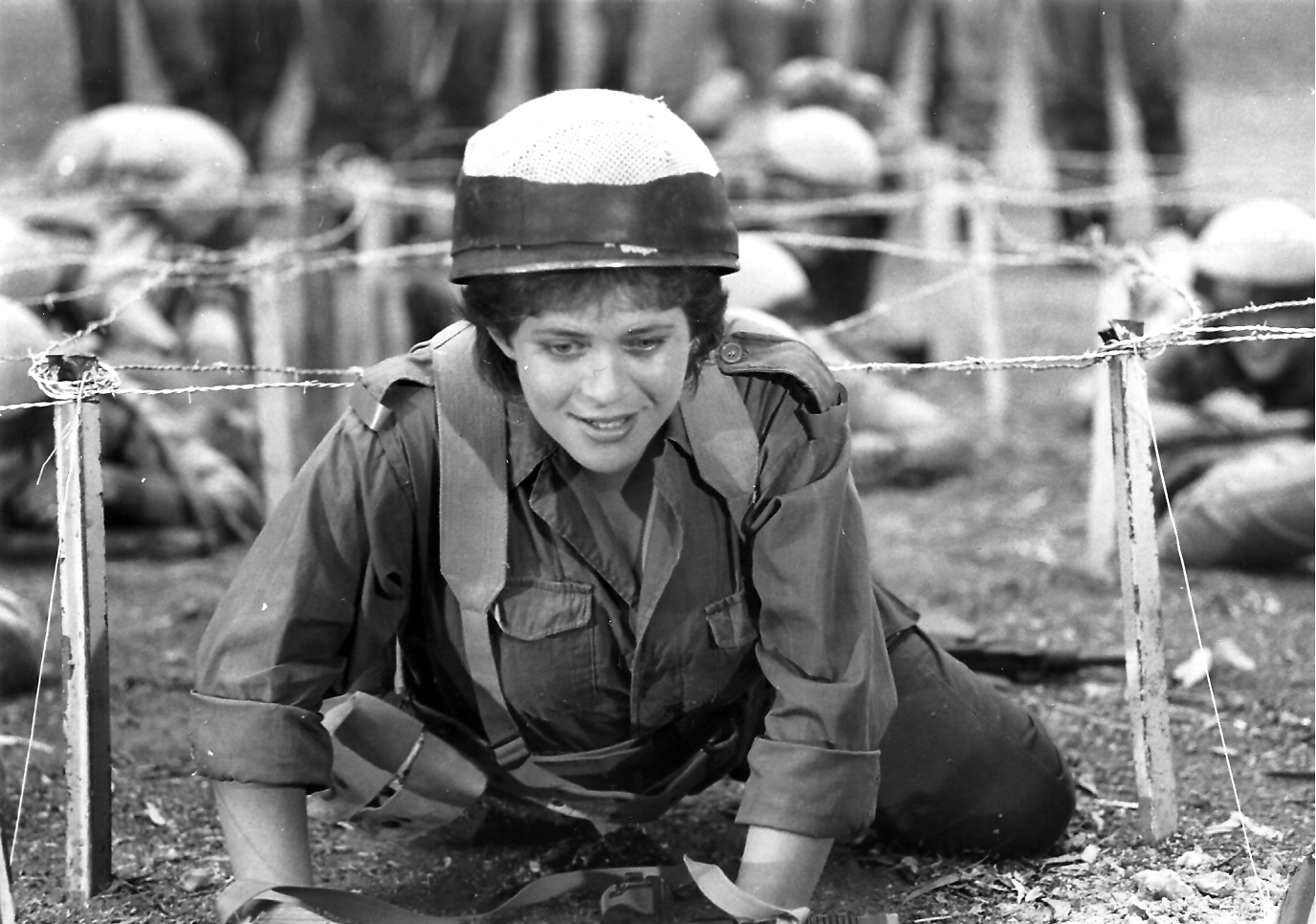 אורנה רוטברג בסרט בנות צילום יוני המנחם